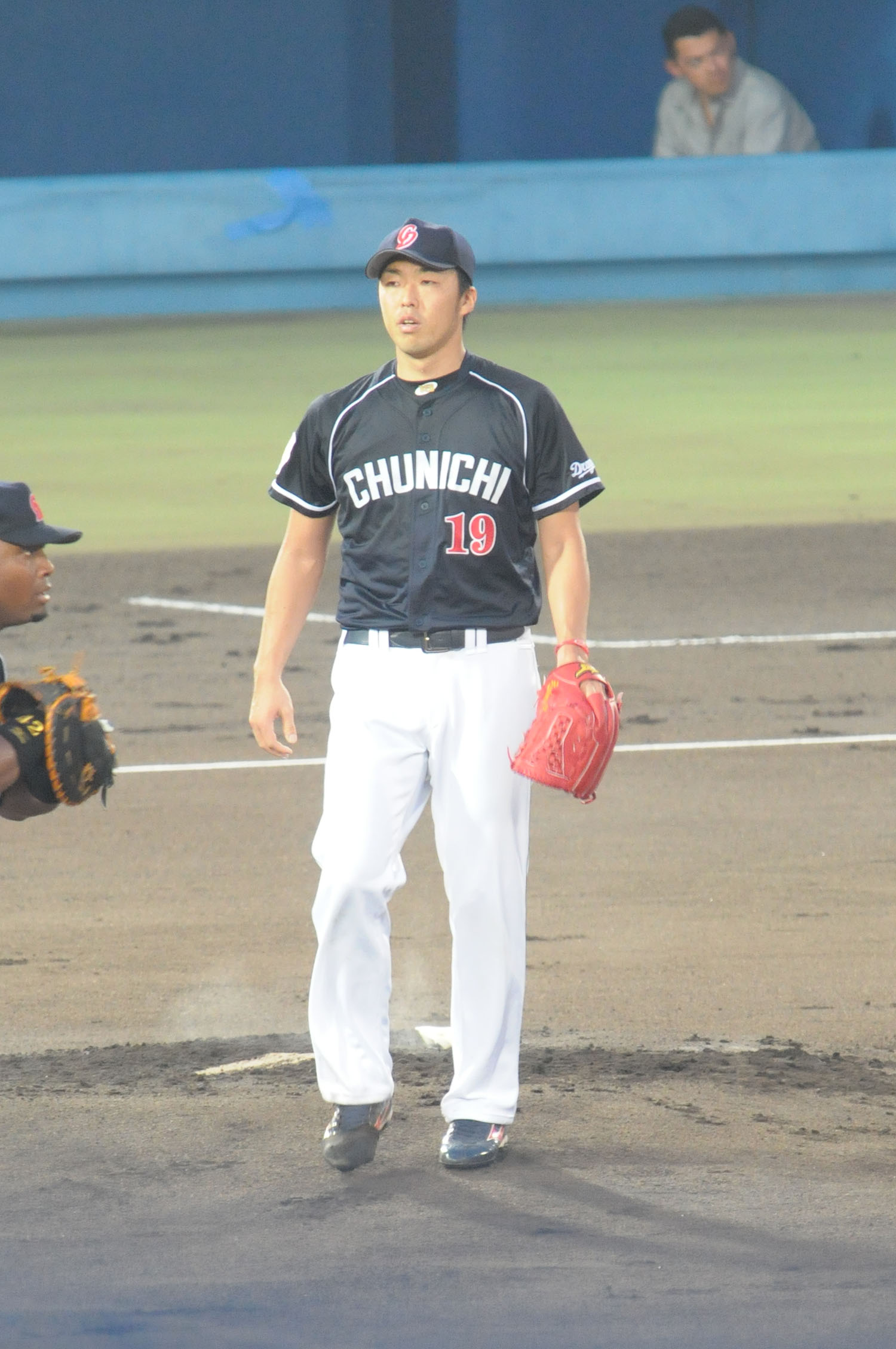 中日ドラゴンズ、吉見一起選手。こまちスタジアムで。